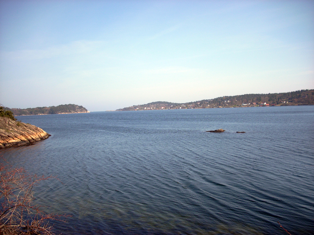 Tromøysund ved utgangen mot øst, Tromøy på høyre side. Bildet er tatt fra Buøya.